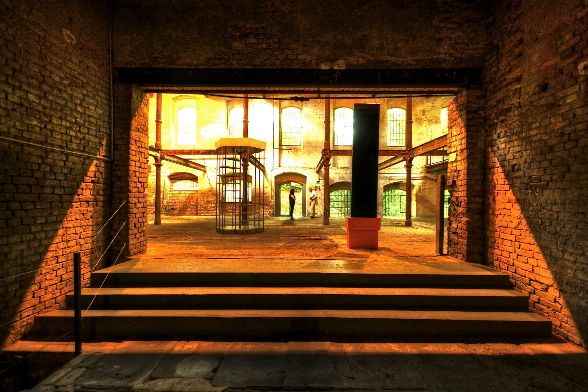 Zacherlfabrik - Ausstellung am ehem. Fabriksgelaende